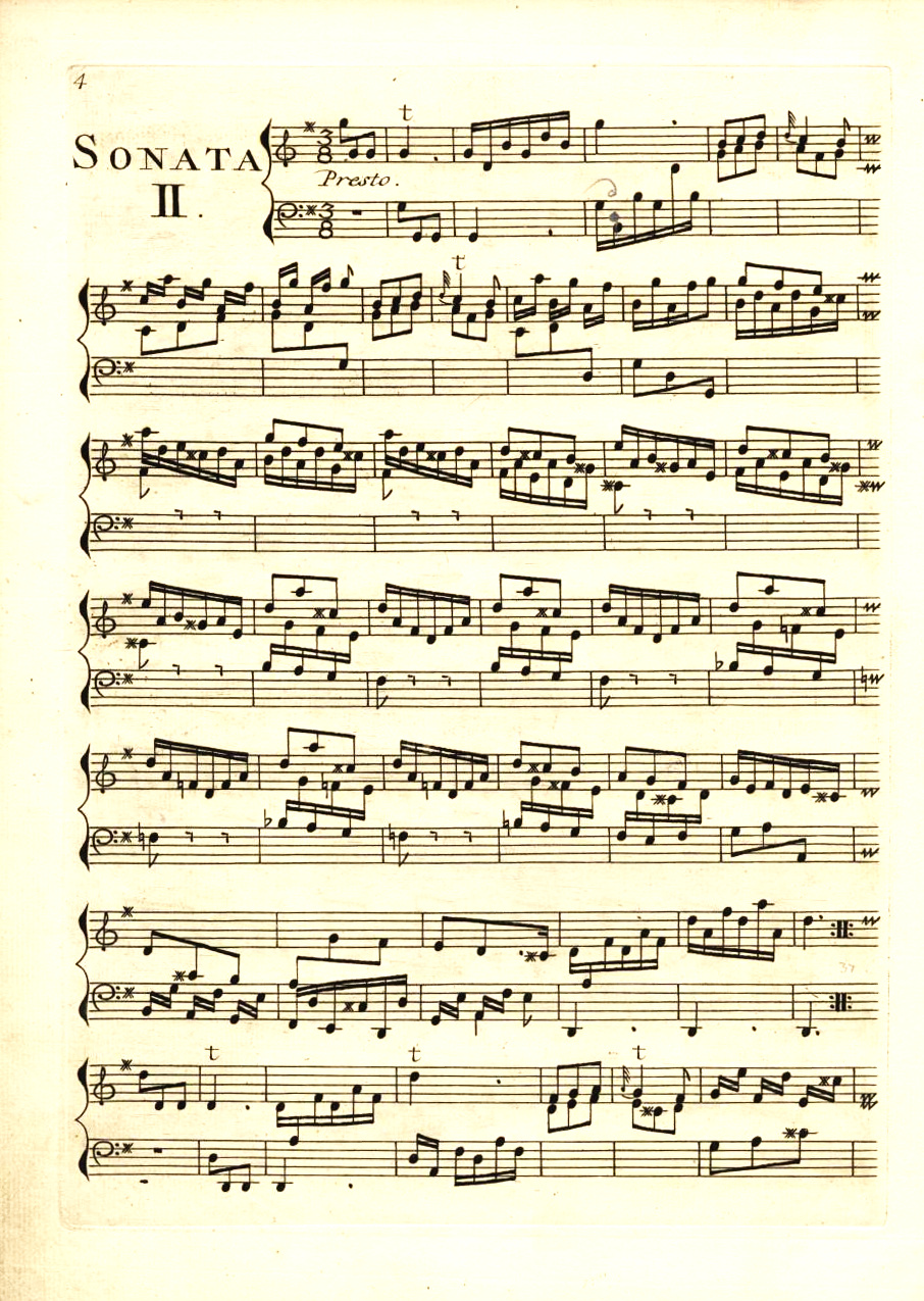 La sonate K. 2, dans une édition des Essercizi per gravicembalo, publiés à Amsterdam en 1742.